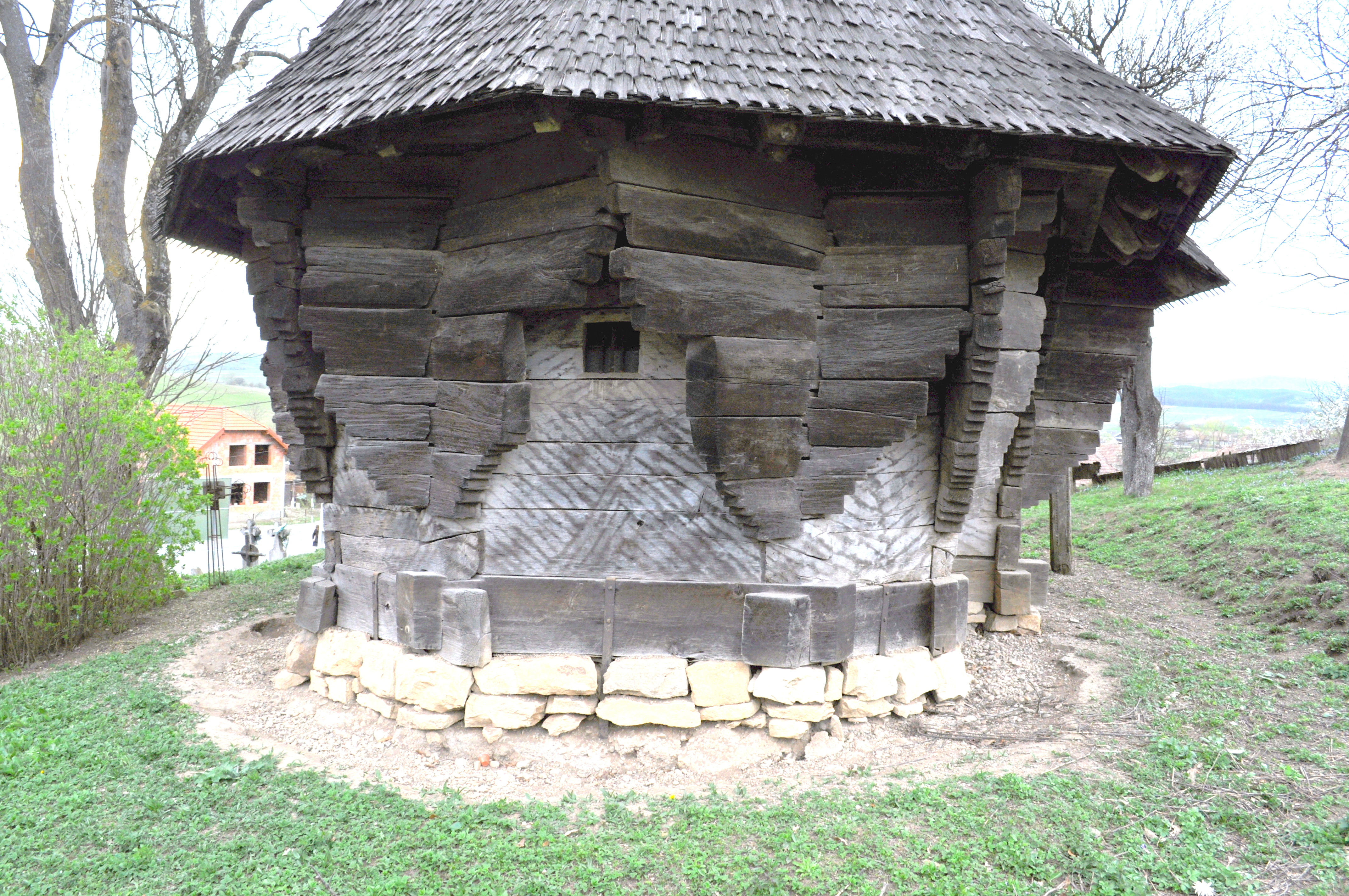 Biserica de lemn „Sfinţii Arhangheli Mihail și Gavriil" din Poarta Sălajului, comuna Românaşi, judeţul Sălaj